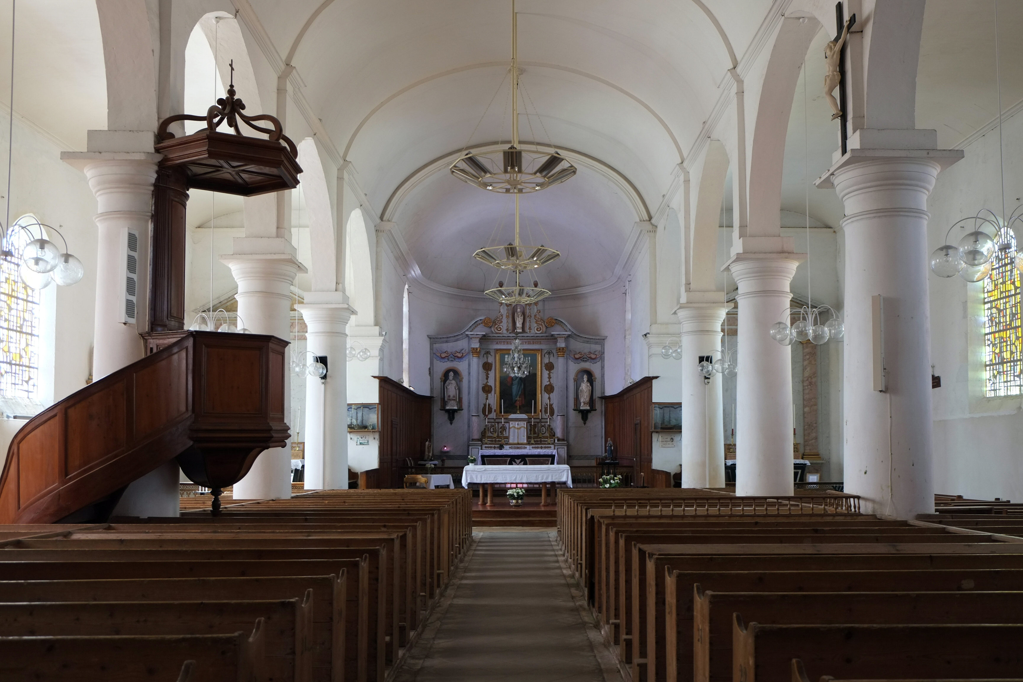 Nef de l'église Saint-Clément Saint-Clément-des-Baleines Charente-Maritime France